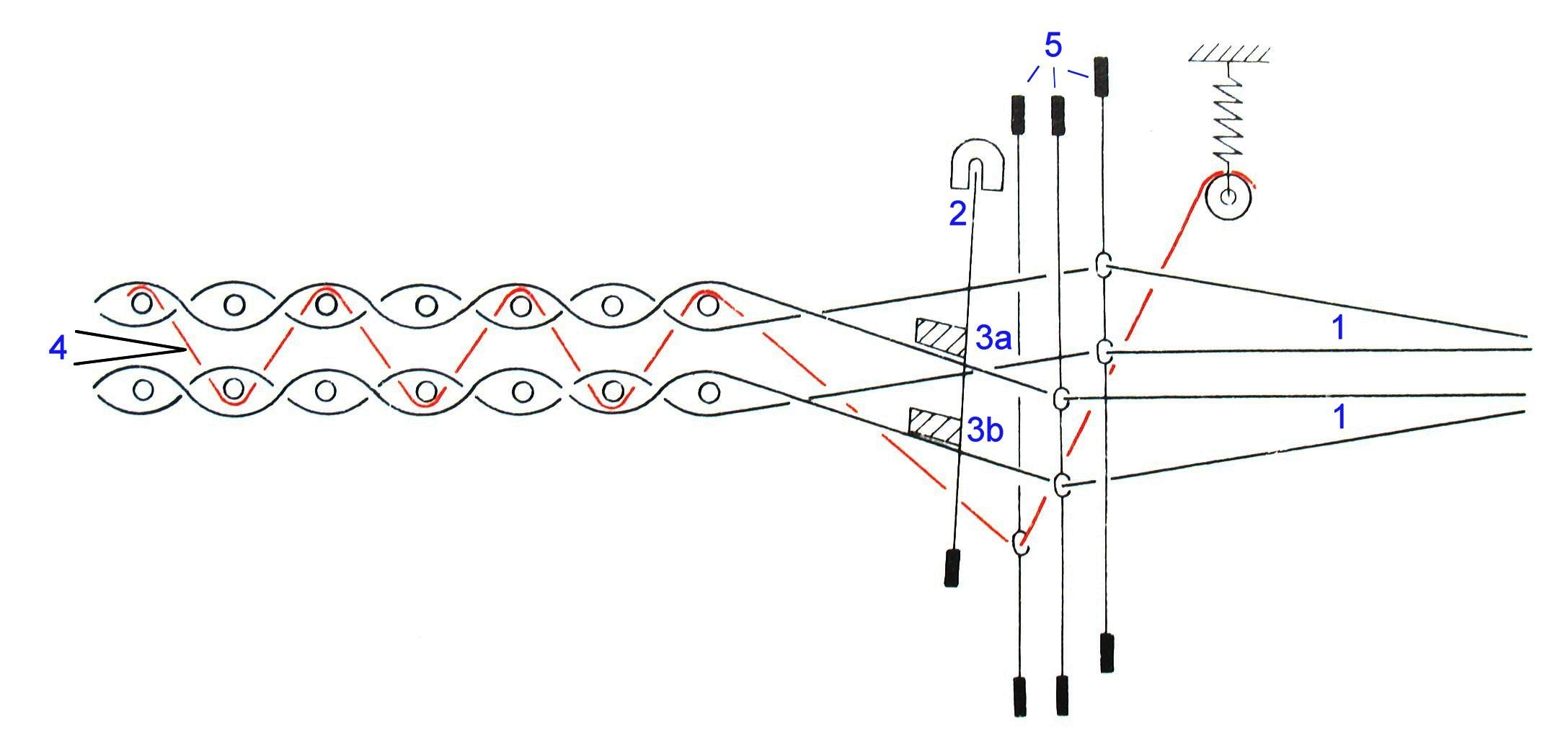 Schema: Weben an einer Doppelplüschwebmaschine